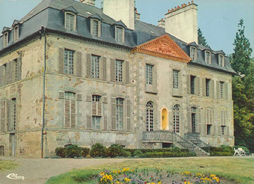 Le Molant